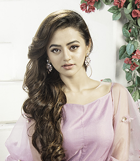 Sajid shahid Clicked Helly Shah in Delhi.